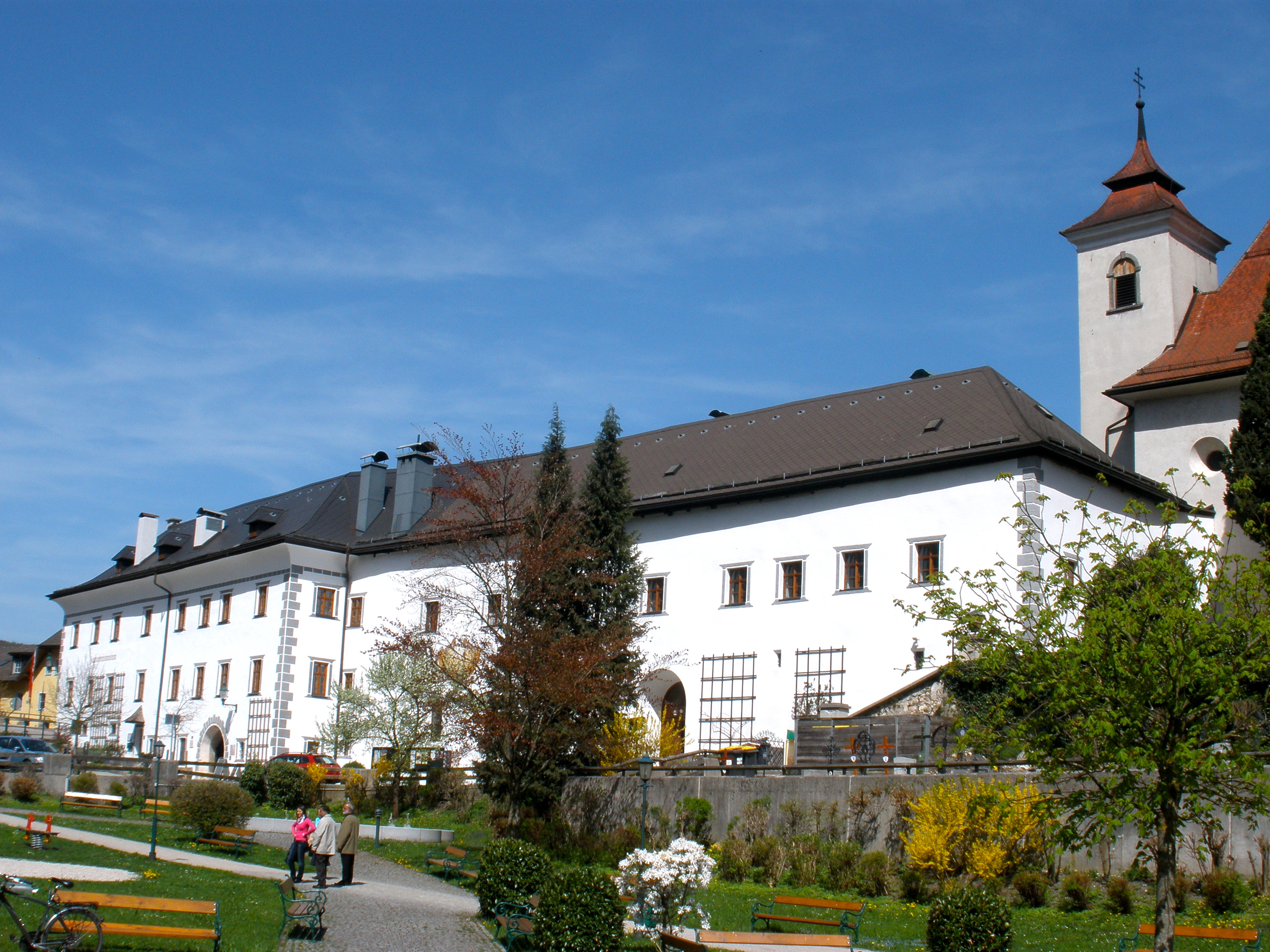 Das ehemalige Jesuitenkloster in Traunkirchen (1773 aufgehoben) beherbergt heute das Pfarramt sowie ein Heimat- und ein Handarbeitsmuseum.